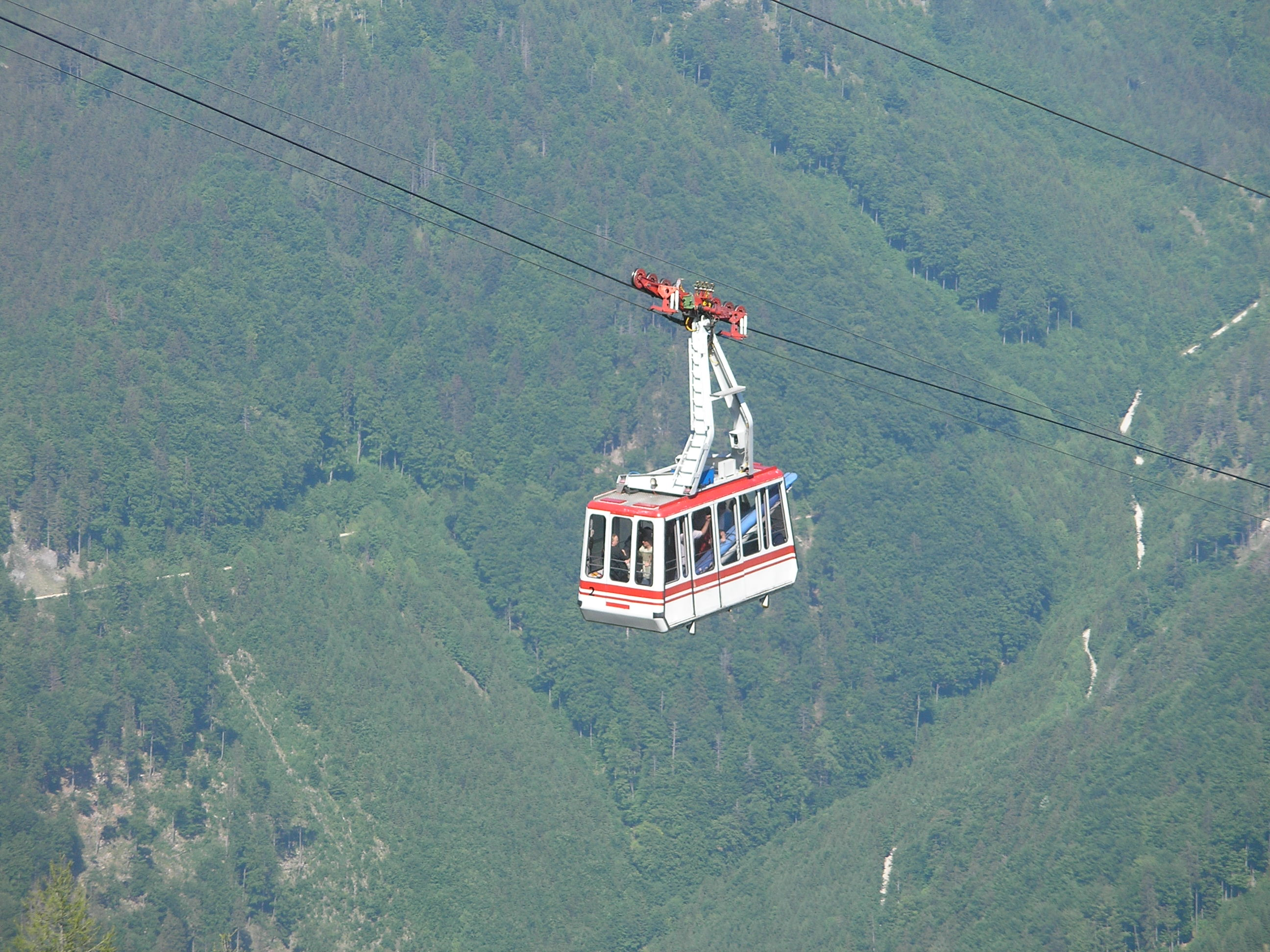 Feuerkogel - Seilbahn